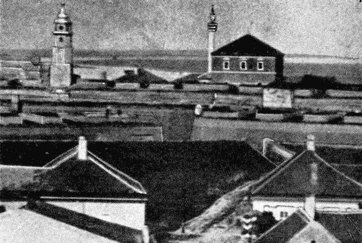 Српски (ћирилица): Džamija sultana Mahmuda u Gornjem gradu, Beogradske tvrđave, Anastas Jovanović, 1876